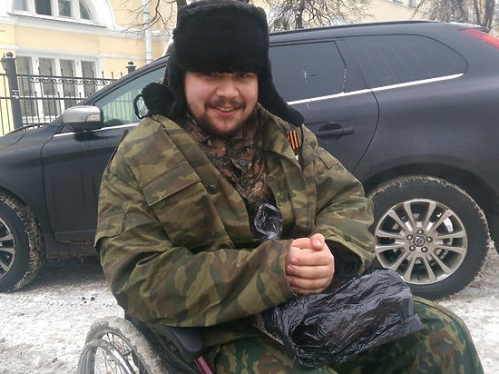 Олег Мельников в образе попрошайки